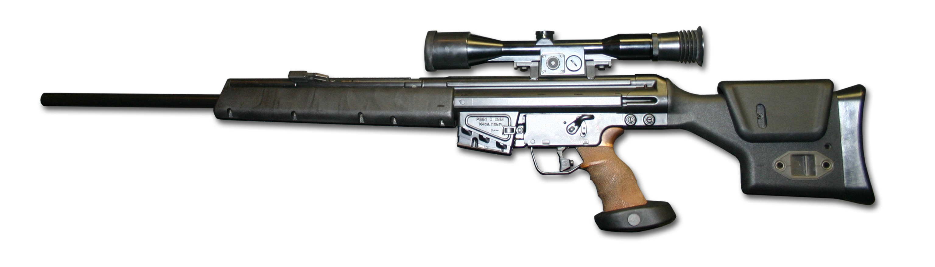 Deutsches Gewehr HK PSG 1